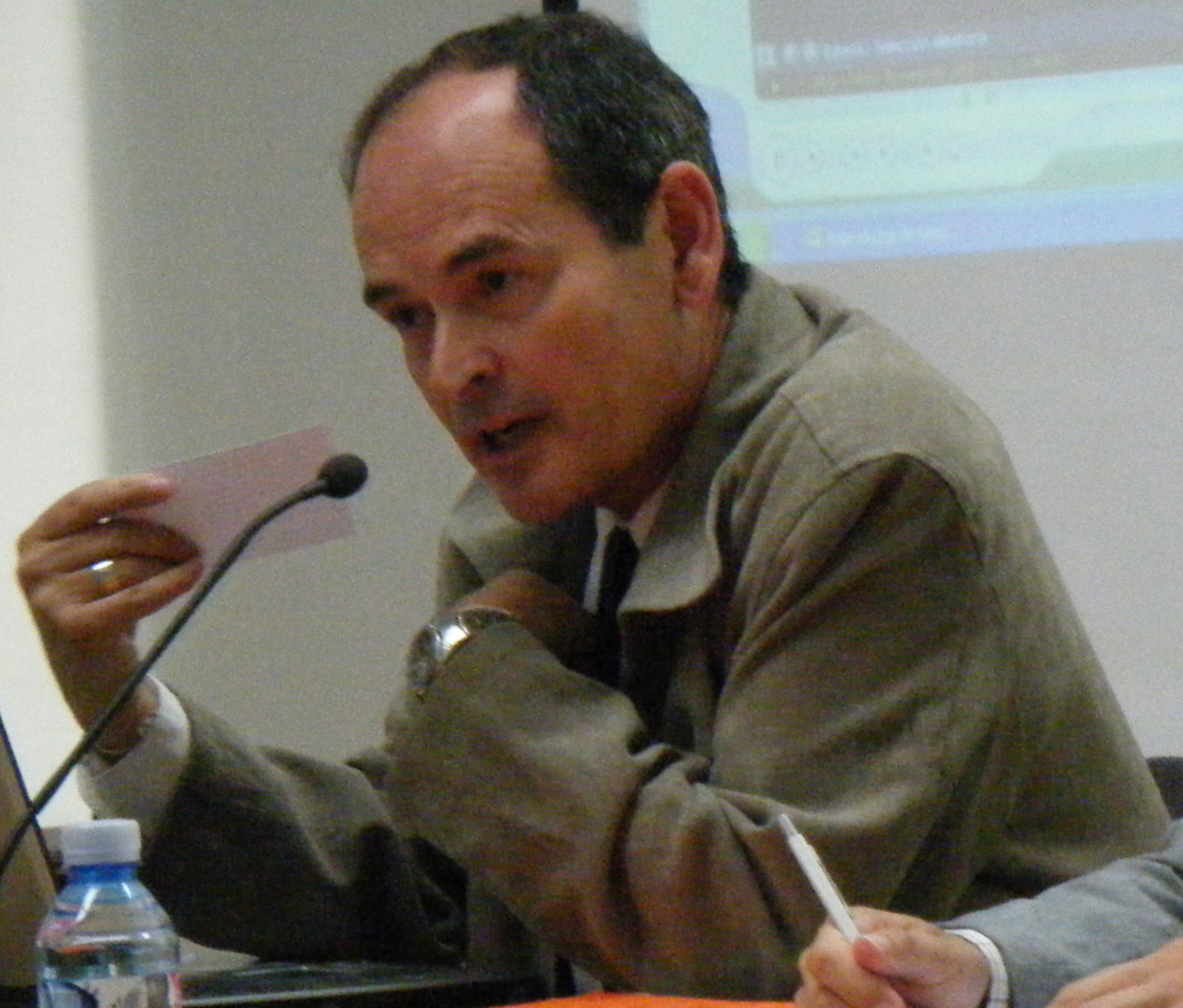 Jose Maria Sanchez Carrion "Txepetx" hizkuntzalaria, 2011n.